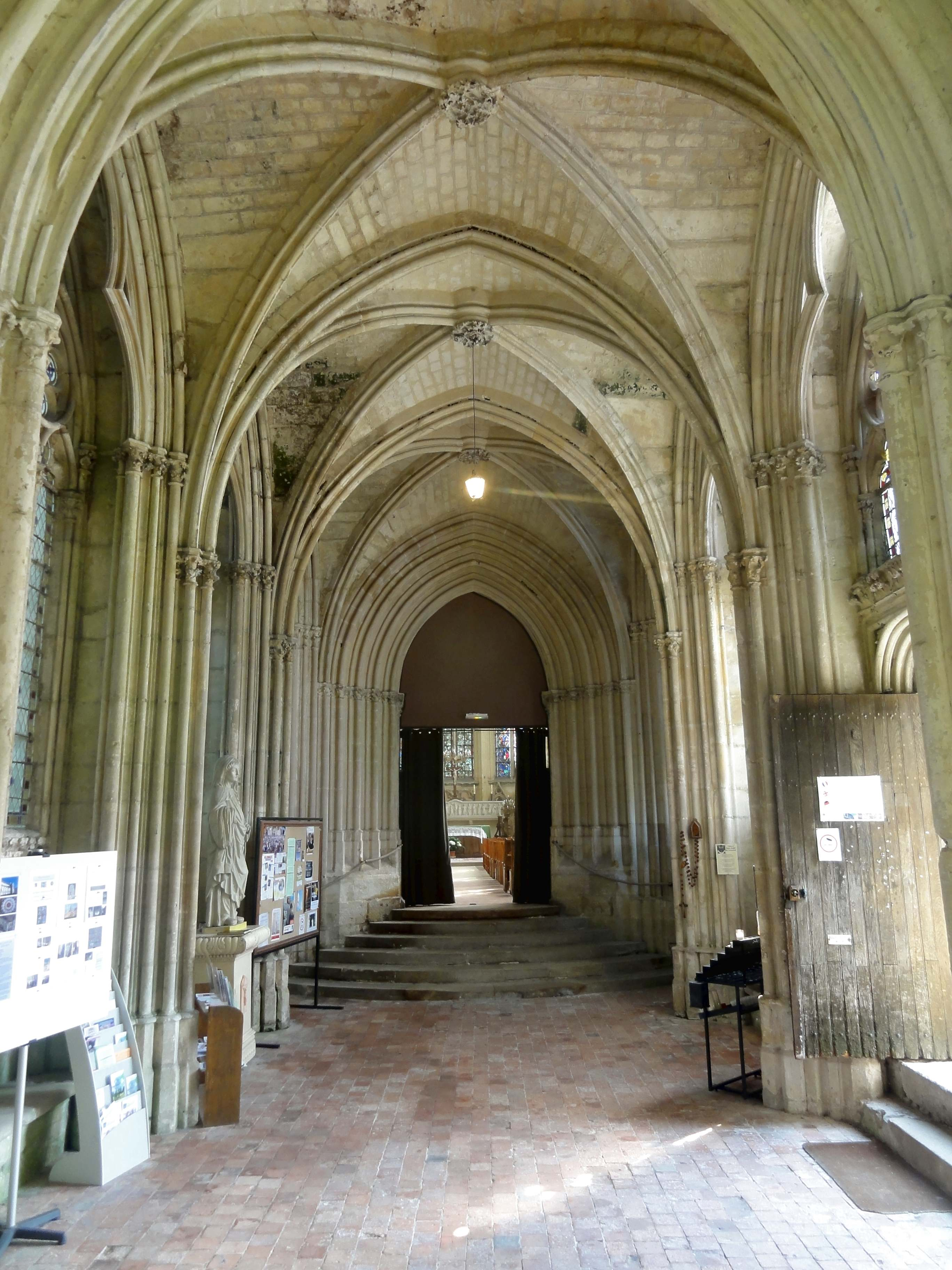 Intérieur de la chapelle de la Vierge (connue comme sainte-chapelle) - voir le titre du fichier.